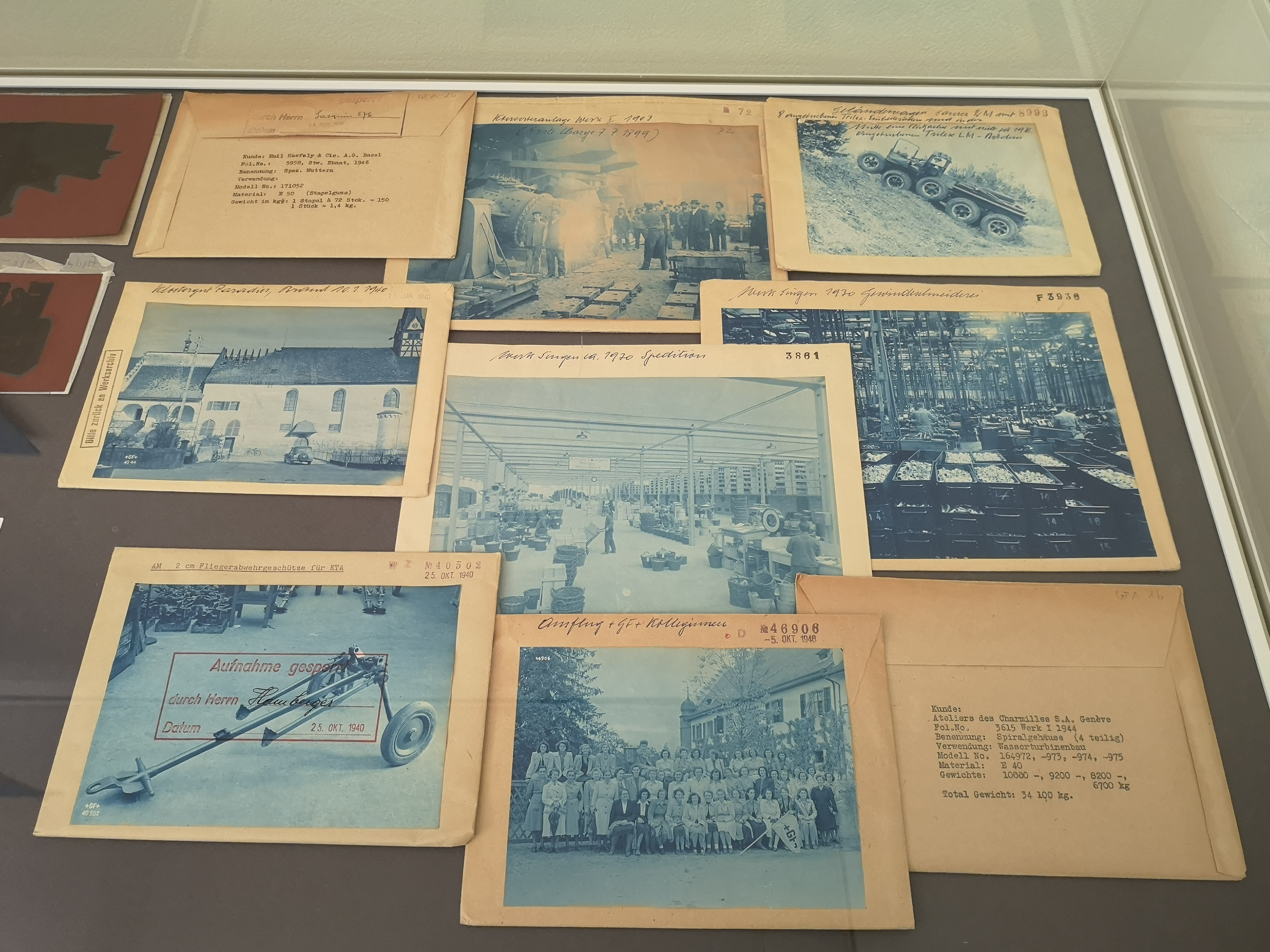 Archiv der Eisenbibliothek